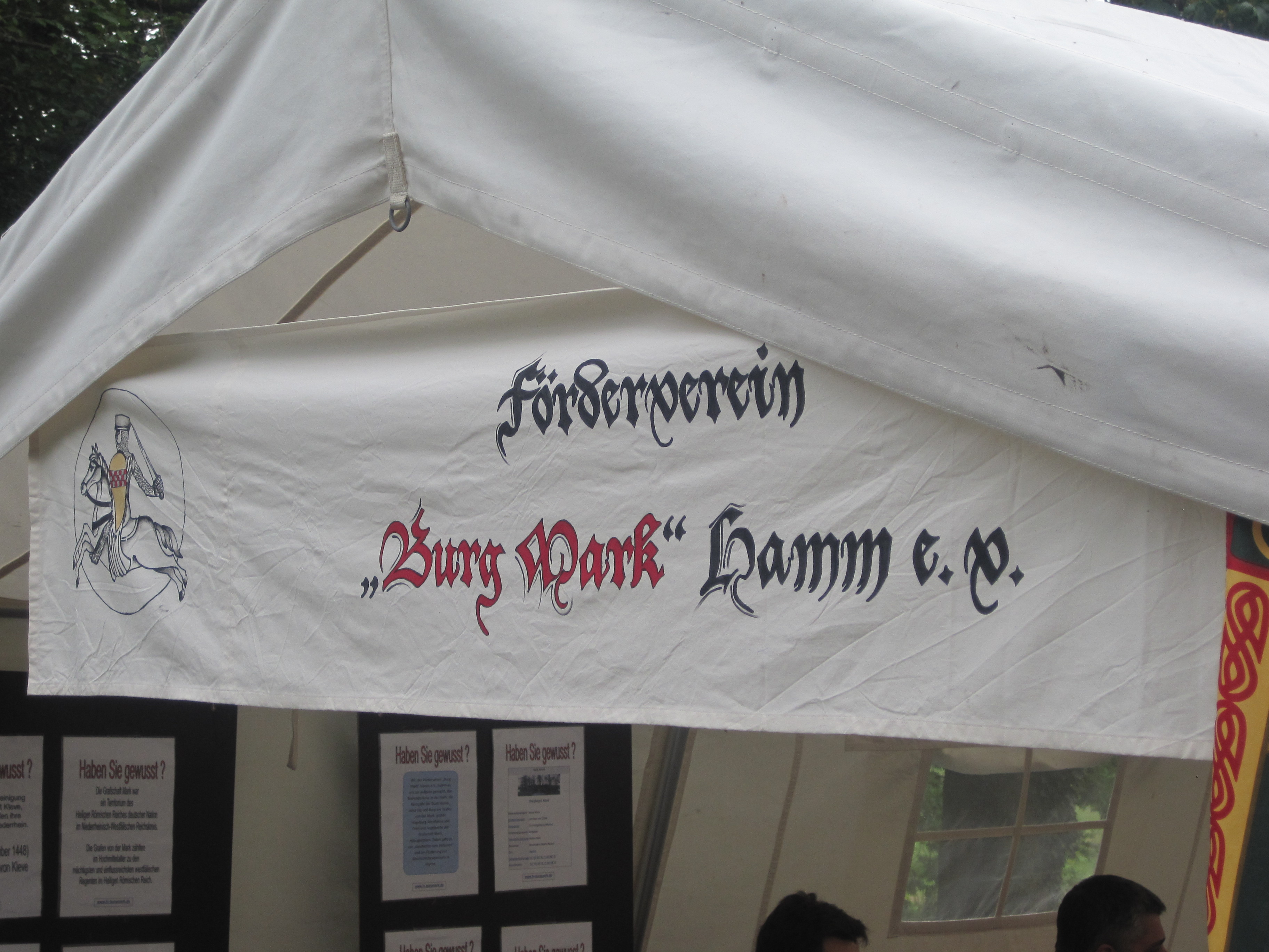 Dieses Foto zeigt das Banner des Fördervereins "Burghügel Mark" Hamm e.V., gefertigt durch Frau Sylvia Huster.